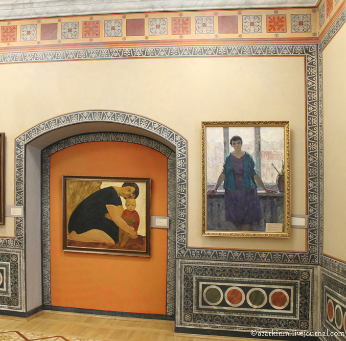 Адноўленыя роспісы. Мастацкая галерэя Міхаіла Савіцкага